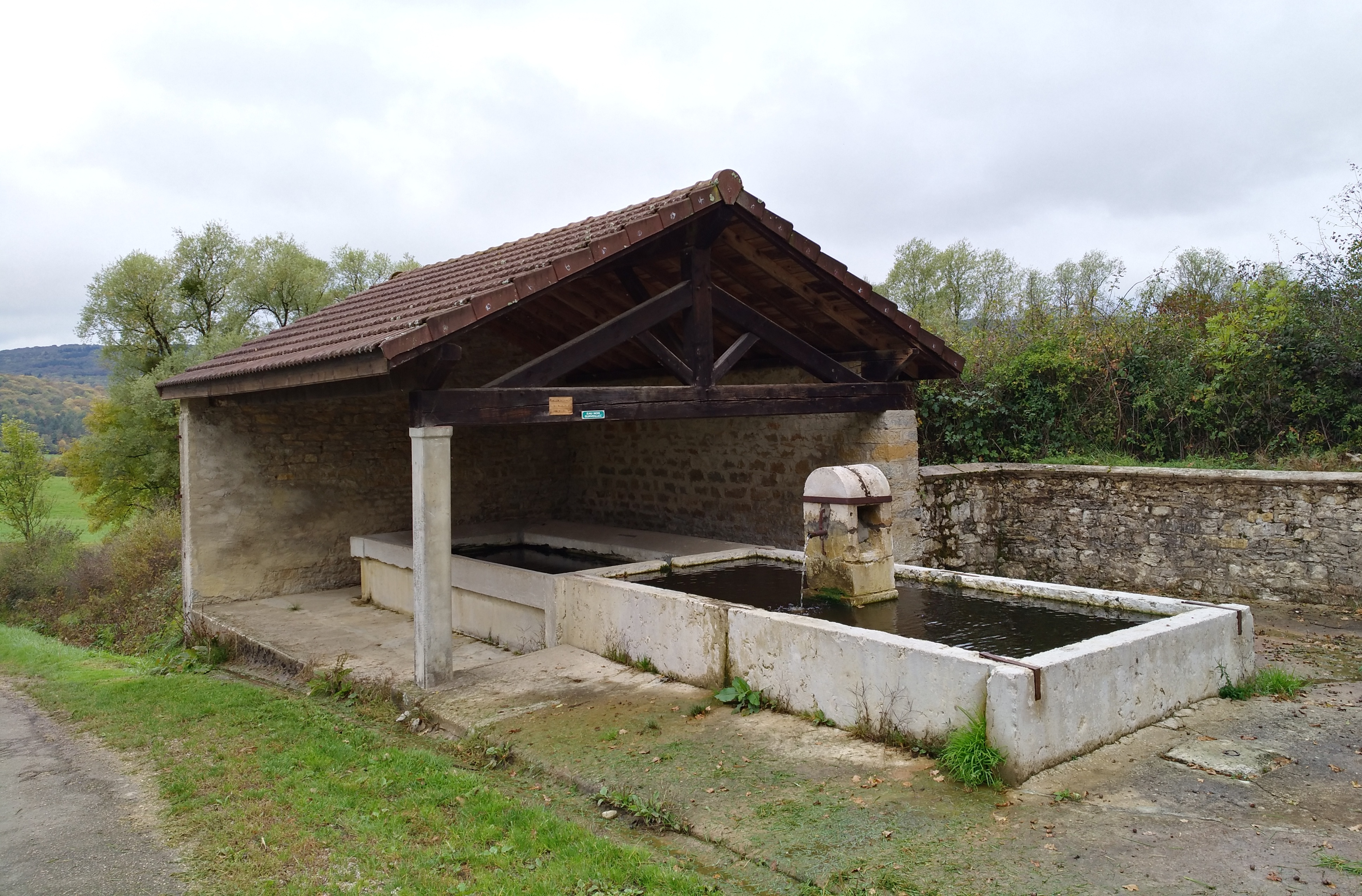 Lavoir à à Ugna, sur la commune de Savigna (Valzin en Petite Montagne, Jura, France).